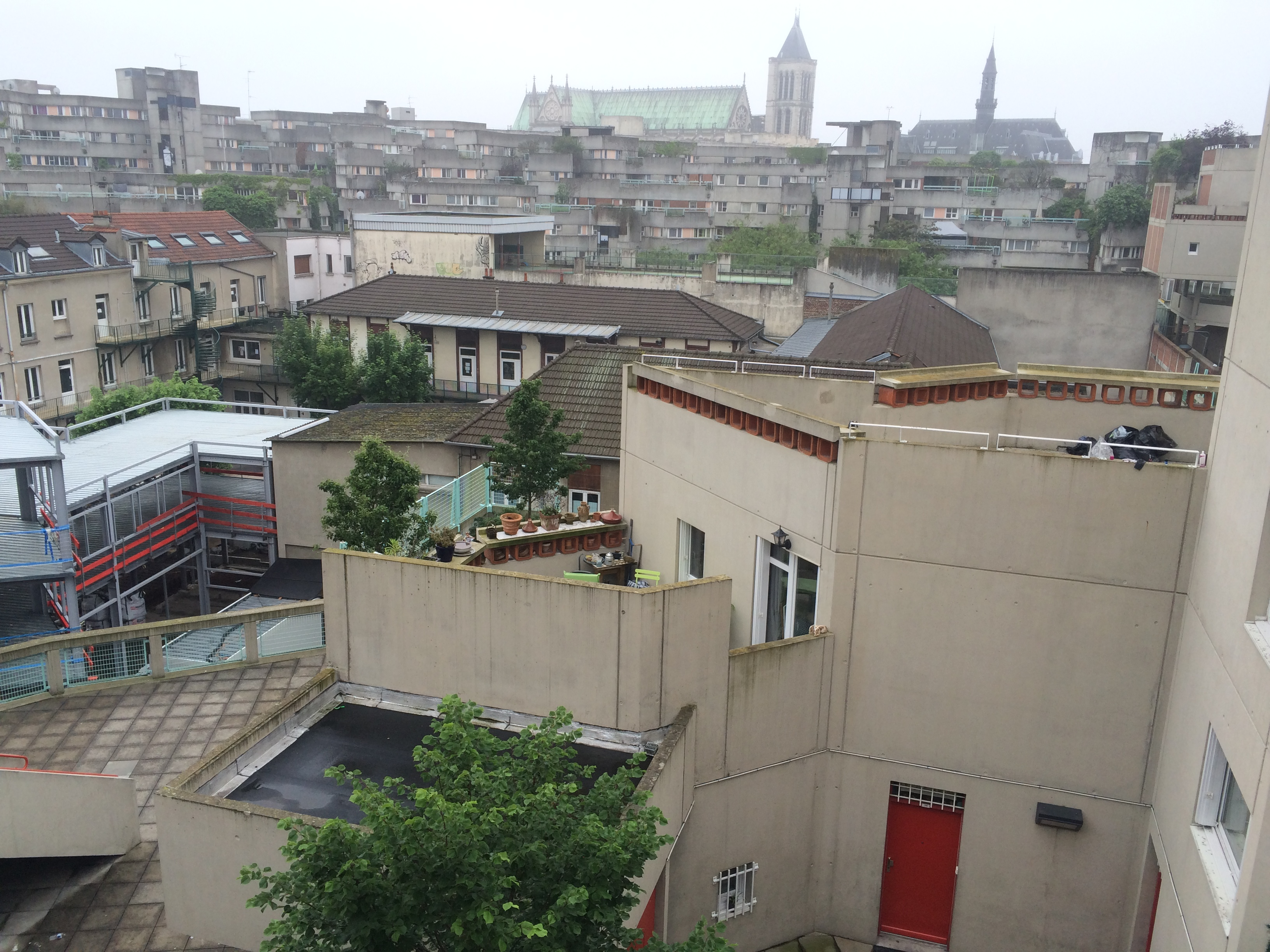 Centre-ville de Saiint-Denis. Au premier plan, l'îlot 9 de la ZAC Basilique. Au centre, l'école Saint-Vincnt de Paul. Au fond, d'autres îlots de la ZAC. Au loin au centre, la Basilique Saint-Denis. Au loin à droite, l'Hôtel de Ville.